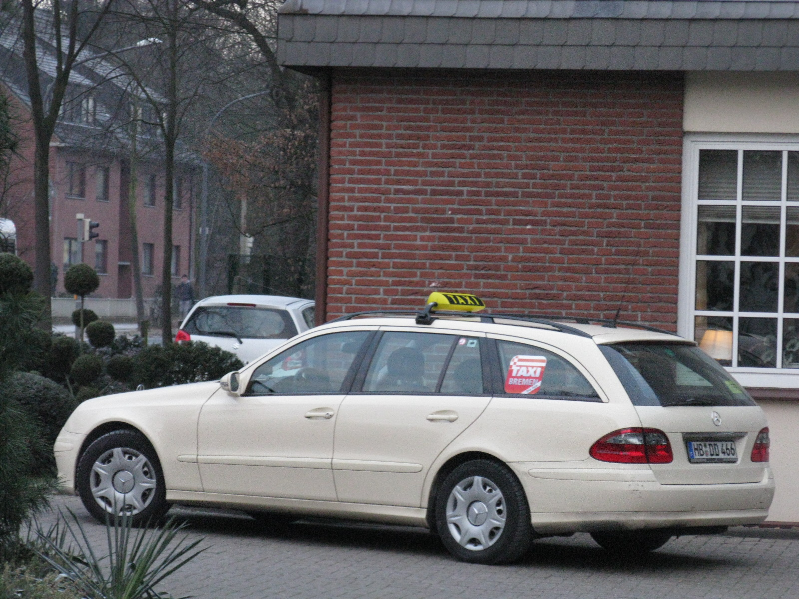 Mercedes-Benz E Class T Taxi W211